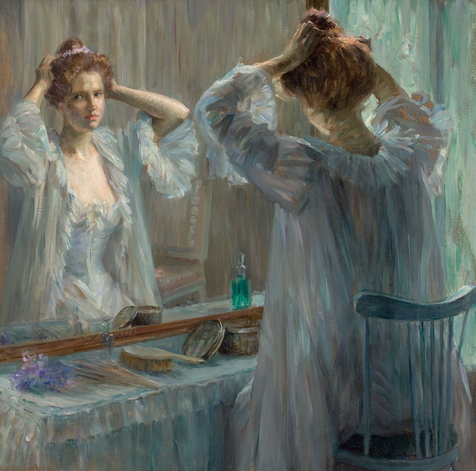 La Toilette